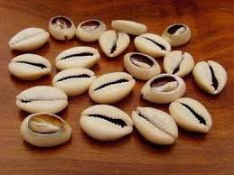 buzios ou cowries utilizados como oráculo dos orixas